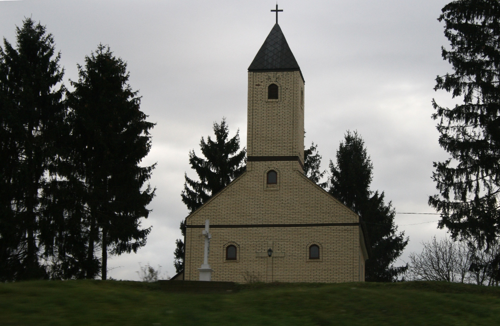 Crkva u Opatovcu